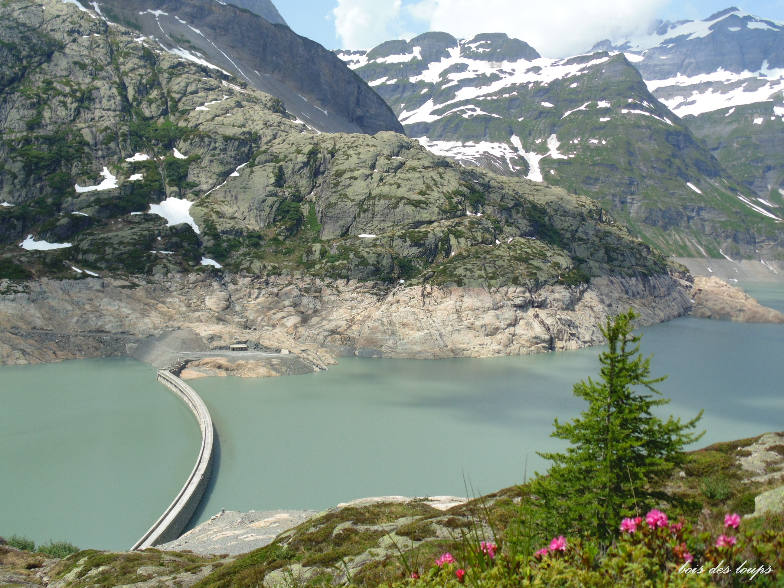 Le barrage de Barberine a été construit de 1920 à 1925 par les CFF (Chemins de fer fédéraux suisses) lorsque le réseau a été électrifié à la fin de la première guerre mondiale pour garantir l'indépendance du pays, le charbon pour les trains à vapeur devant être importé (d'Allemagne en particulier). Ce barrage a fermé le verrou de la haute vallée de Barberine, en amont du plateau d'Émosson. Il produisait avec ses deux centrales électriques du courant à la fréquence ferroviaire nord-européenne de 16 ⅔ Hz, correspondant aux besoins des CFF pour toute la Suisse romande. Il est de type poids, d'une hauteur de 79 mètres et son volume d'eau est de 40 millions de m³.